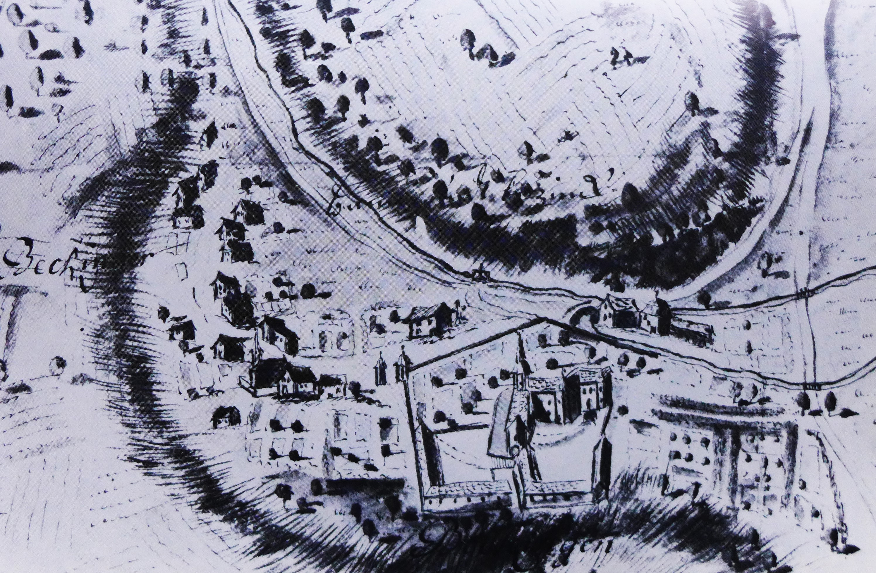 Die Deutschordenskommende und das Dorf Beckingen im Jahr 1736, Landeshauptarchiv Koblenz, 702, 5.840